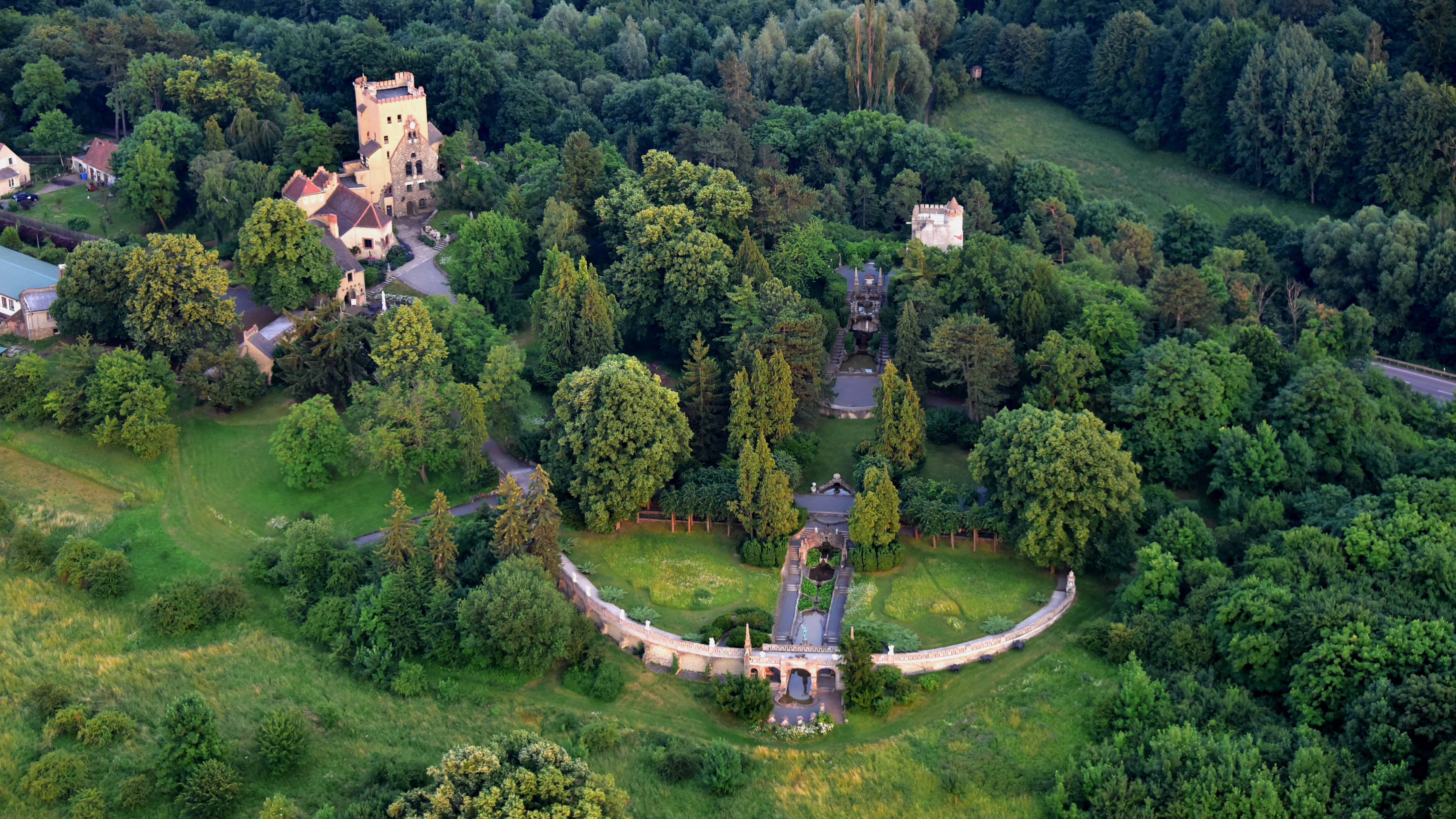 Roseburg (Schloss), Luftaufnahme (2017)